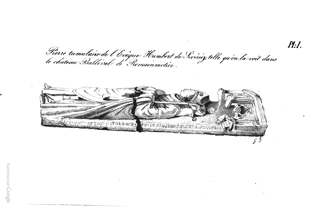 Monument sépulcral d'Henri de Sivirie